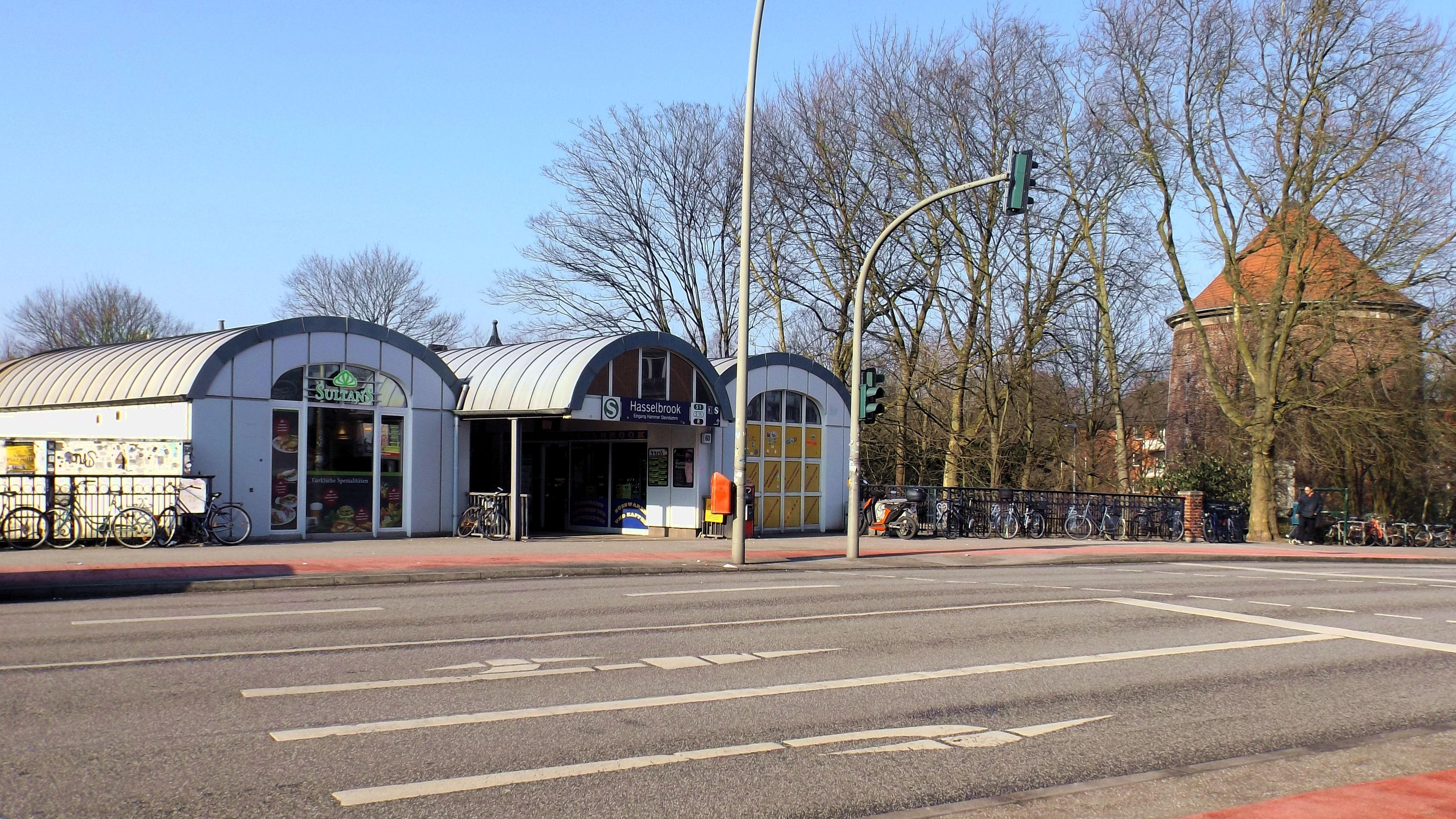 Hammer Steindammbrücke mit Zugang zum S-Bahnhof Hasselbrook, im Hintergrund rechts ein Luftschutzbunker der Bauart "Zombeck"